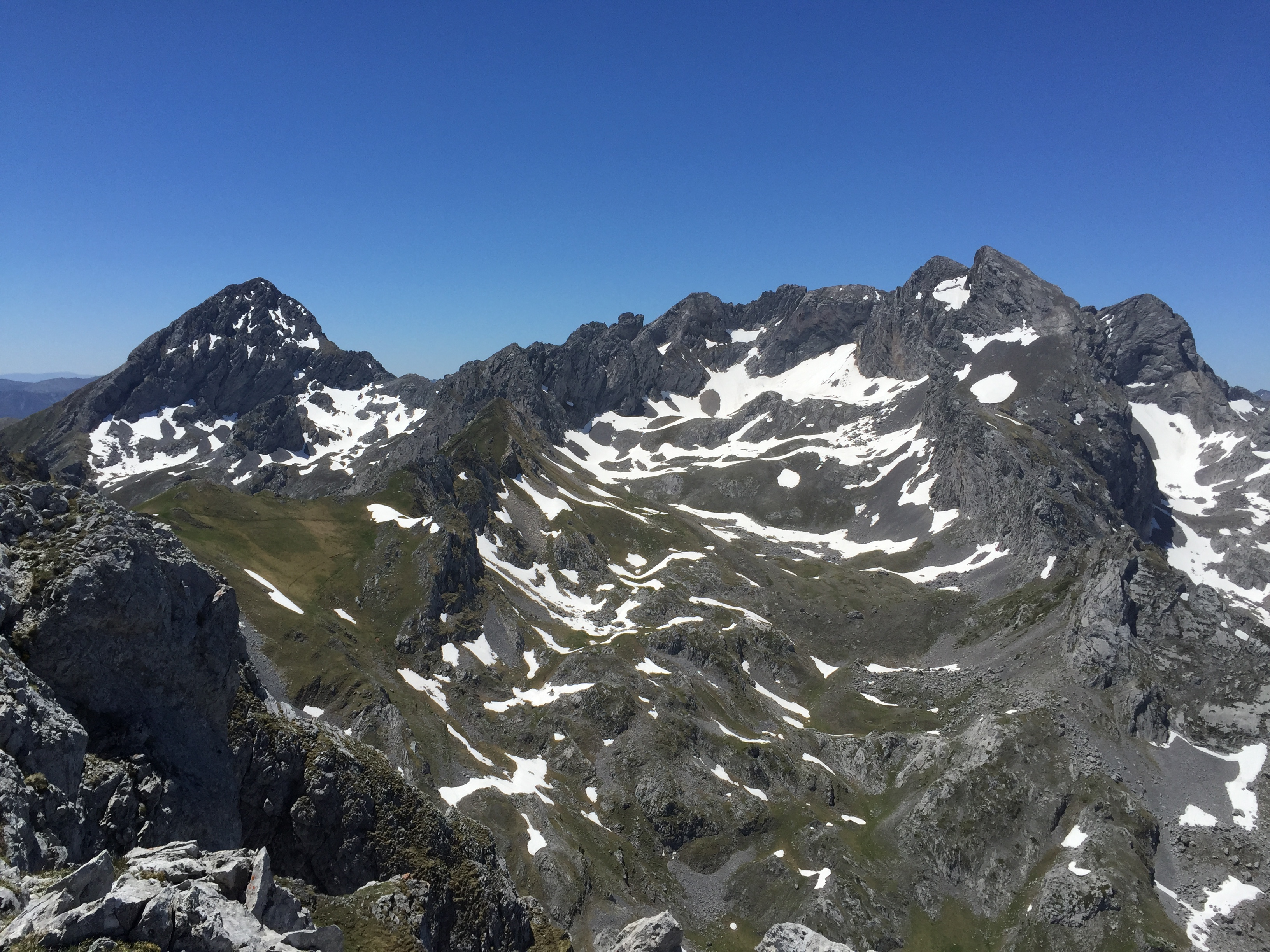 Peña Ubiña,Prau Capón,Cabeza de Arco,Puerta de Arco,Castillines I,II Y III,el Siete,Crestón de pasu malu,Fontan norte y Fontan sur.foto realizada desde el pico Fariñentu. This is a photography of a Special Area of Conservation in Spain with the ID: ES1200011. Natura2000 entry, EEA entry